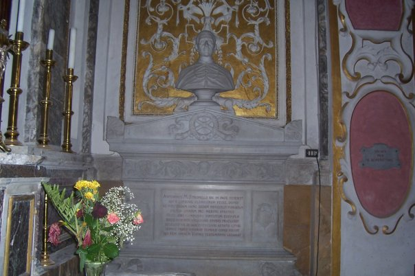 Il sepolcro di Mons. Antonino M. Stromillo nella cappella dell'Immacolata nella Cattedrale di Caltanissetta